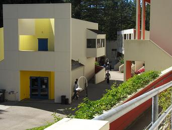 KresgeApartmentsandLaundry